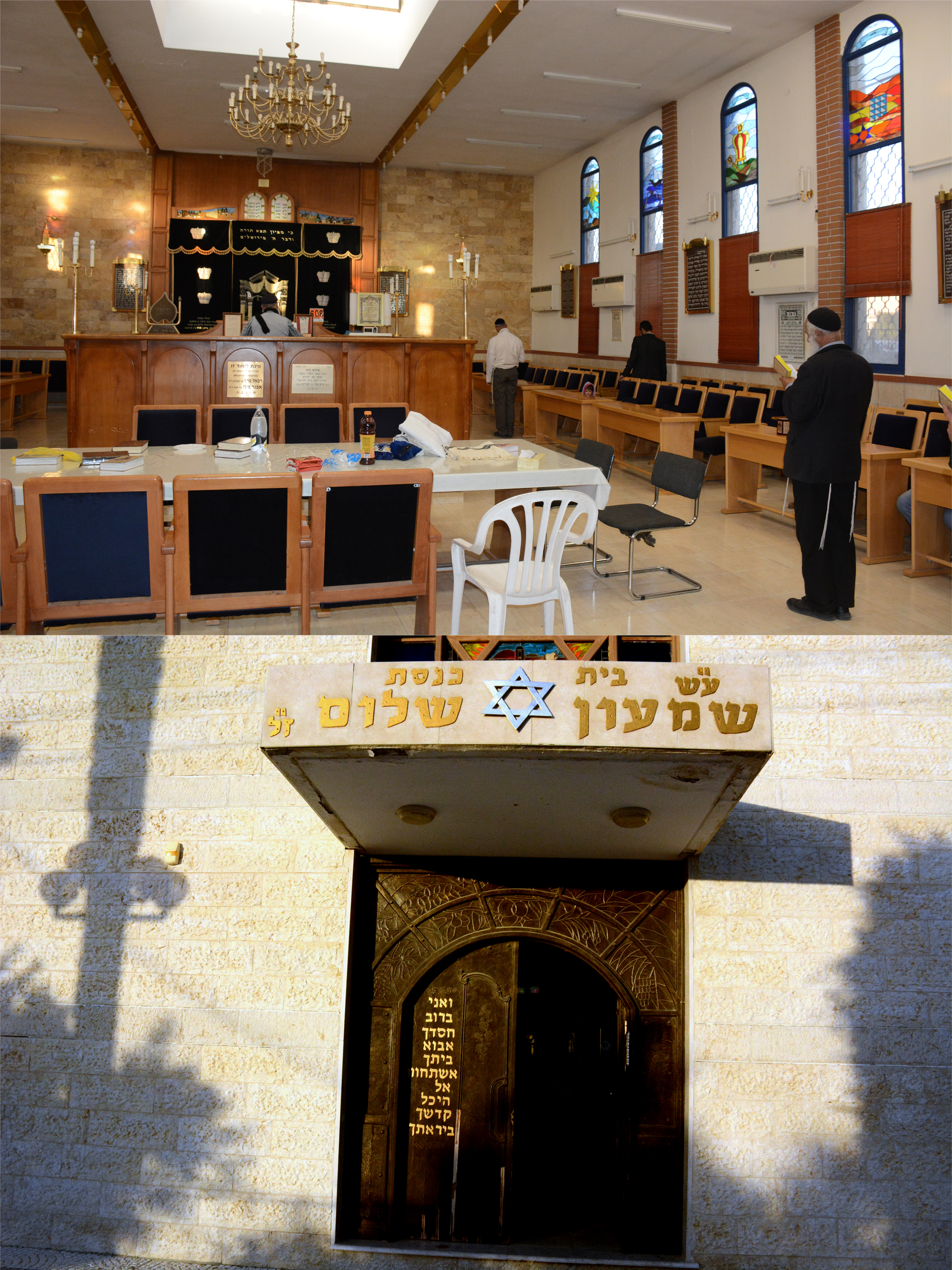 בית הכנסת ע"ש שמעון שלום שהוקם לזכר אביו של סילבן שלום